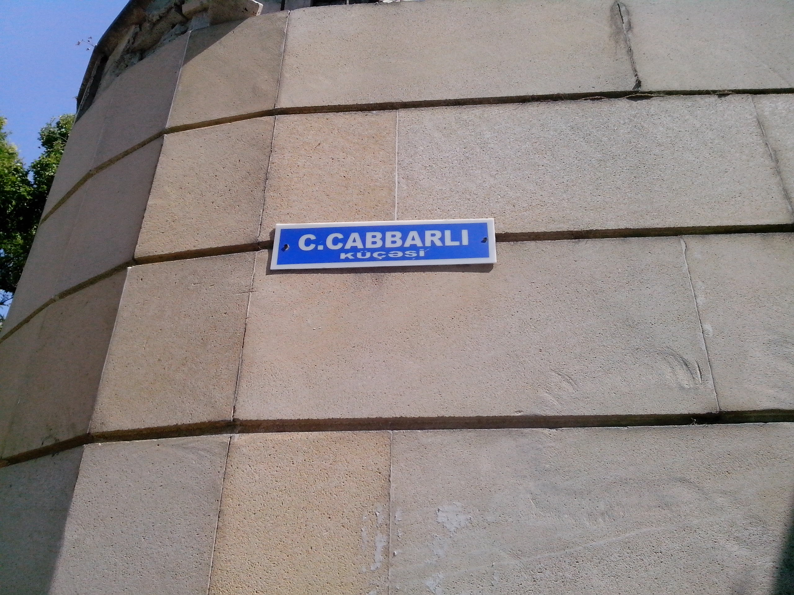 Sumqayıtda Cəfər Cabbarlı küçəsi